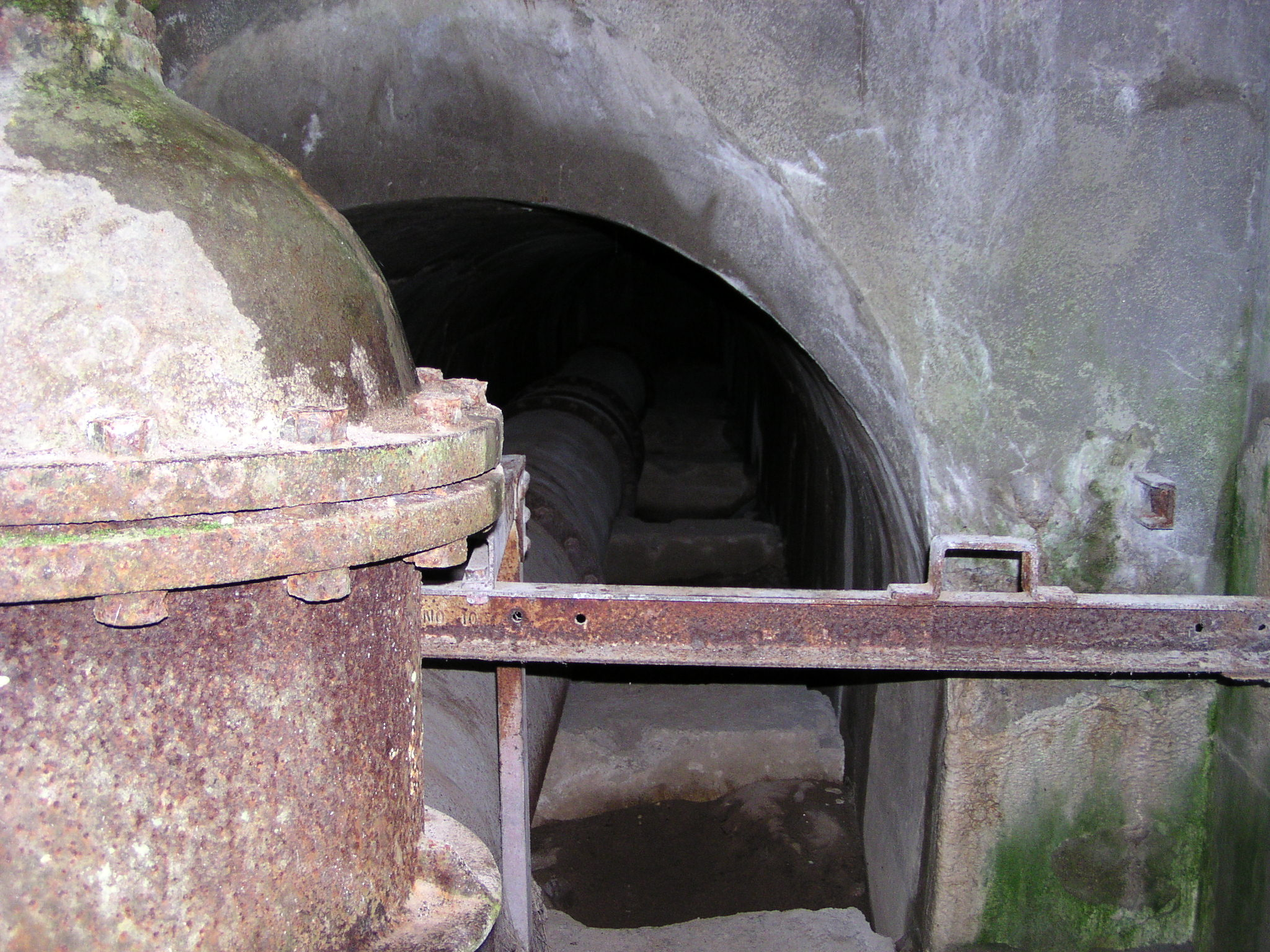 Česky: Ventil s potrubím na přehradě Desná